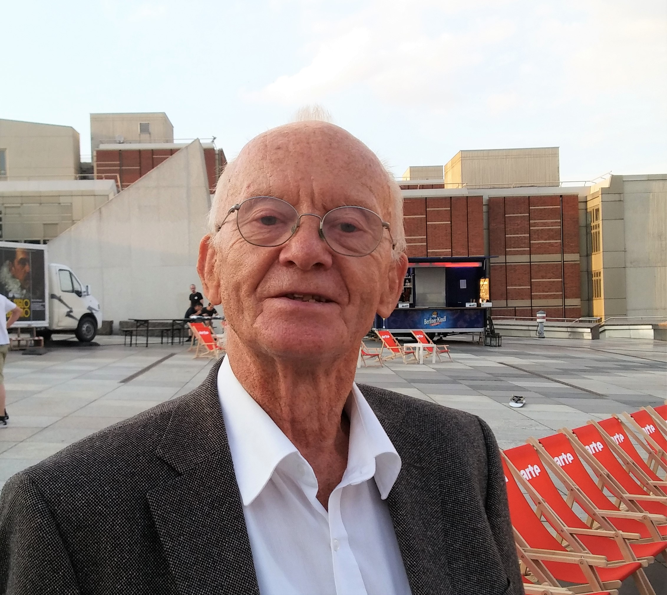 Der Architekt Prof. Dietmar Kuntzsch am Berliner Kulurforum, 2016.